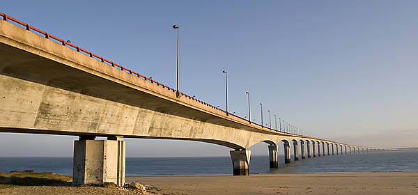 Le Pont de l'île de Ré - Côté Rivedoux-Plage - île de Ré - france Photo issue de ma banque d'images (Alain Pep.per).